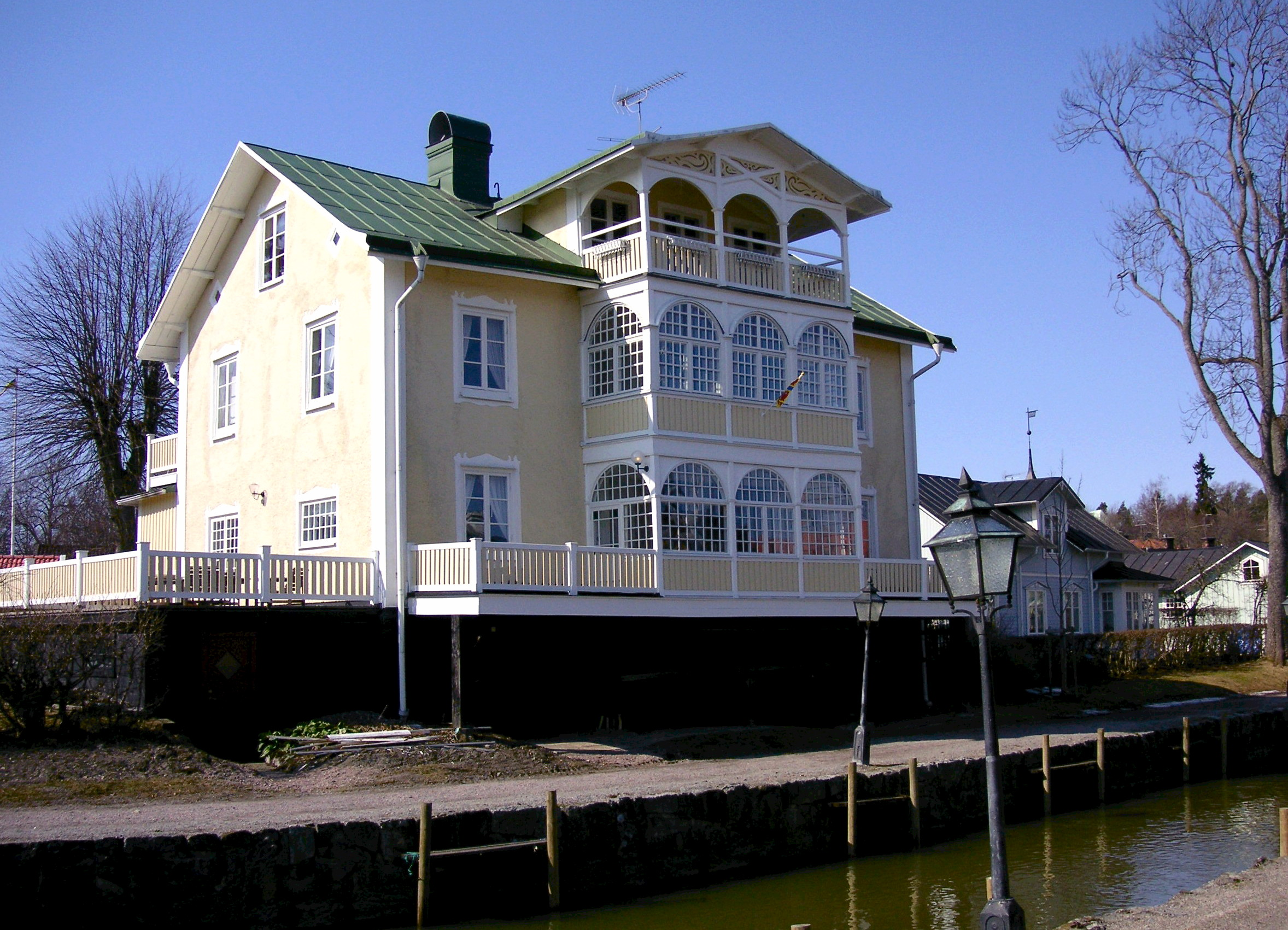 Trävilla i schweizerstil i Trosa